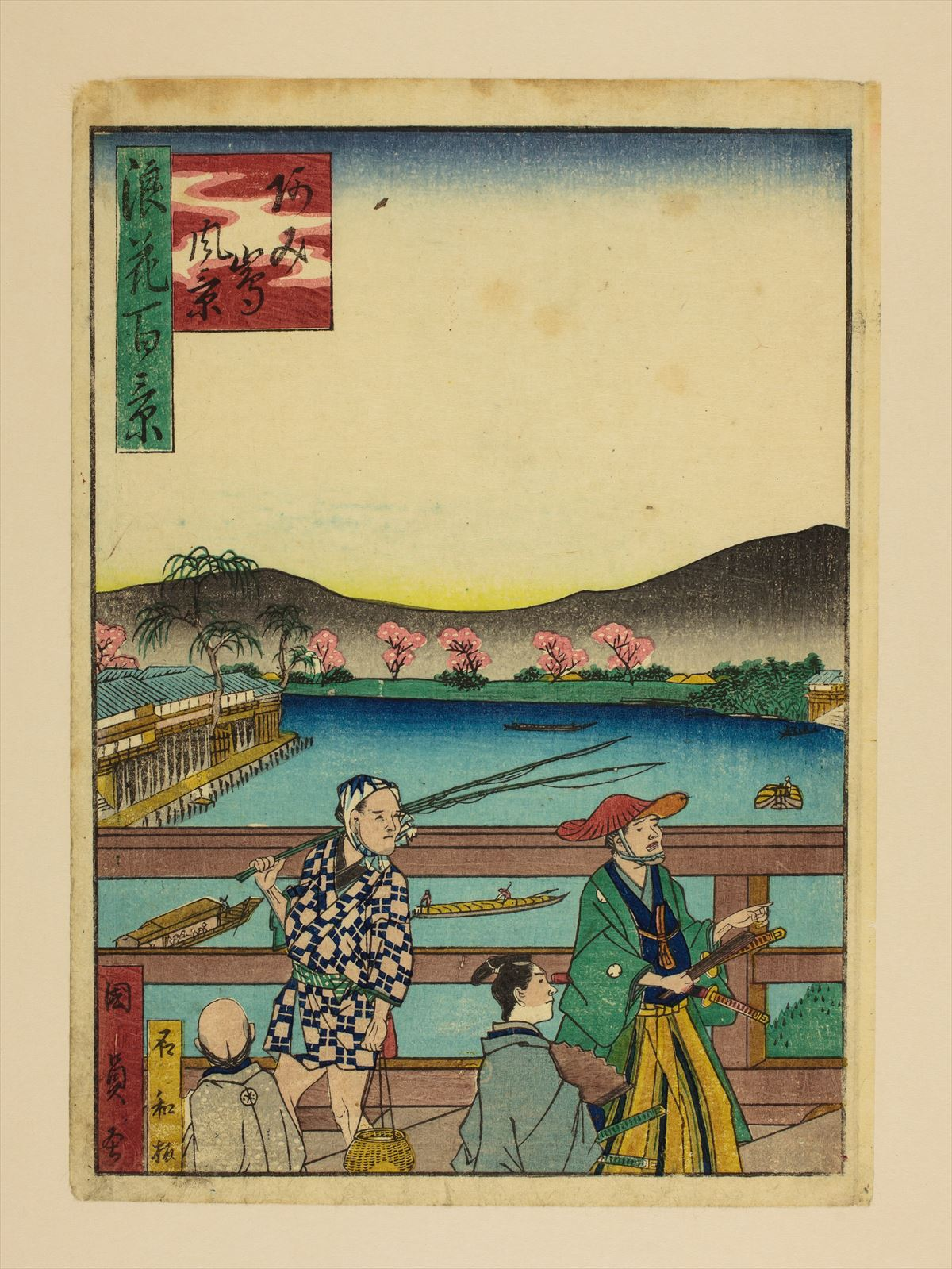 1800年代。歌川國員/画。浪花百景 102枚のうちの1枚。大阪市立中央図書館蔵。